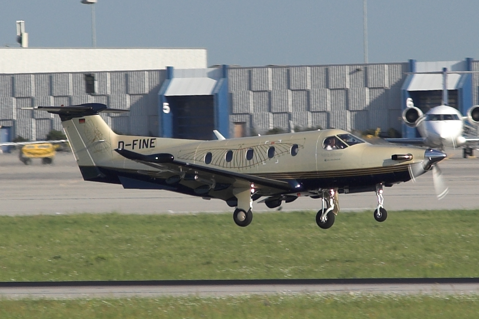 Natenco Windkraftanlagen Pilatus PC-12/47 (D-FINE)